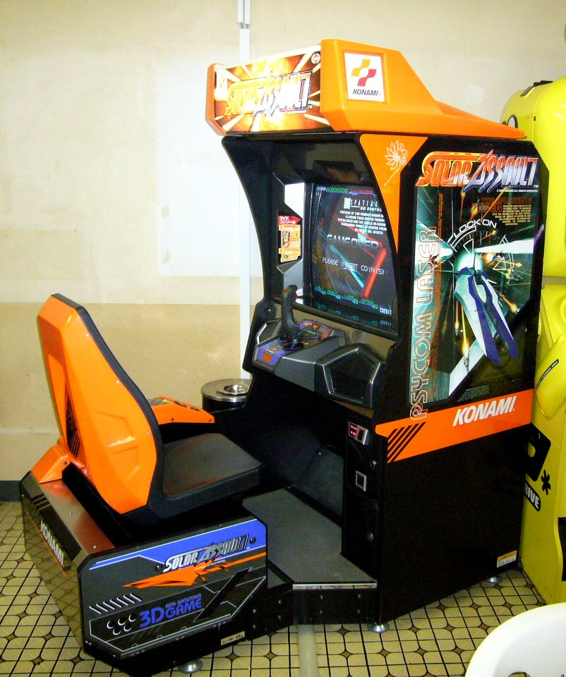 『ソーラーアサルト』のSD型（29インチブラウン管）筐体。 投稿者撮影、投稿者私物。 2008年8月、北海道札幌市のゲームセンターに設置されているものを撮影。